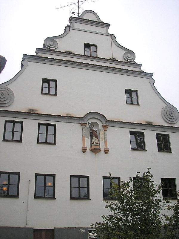 Weiherhof bei Döpshofen, Landkreis Augsburg, Bayerisch-Schwaben. Der Schmuckgiebel. Eigene Aufnahme, Sept. 2006 / Weierhof near Doepshofen (Bavaria, Germany). The ornamental gable. Own photo, Sept. 2006